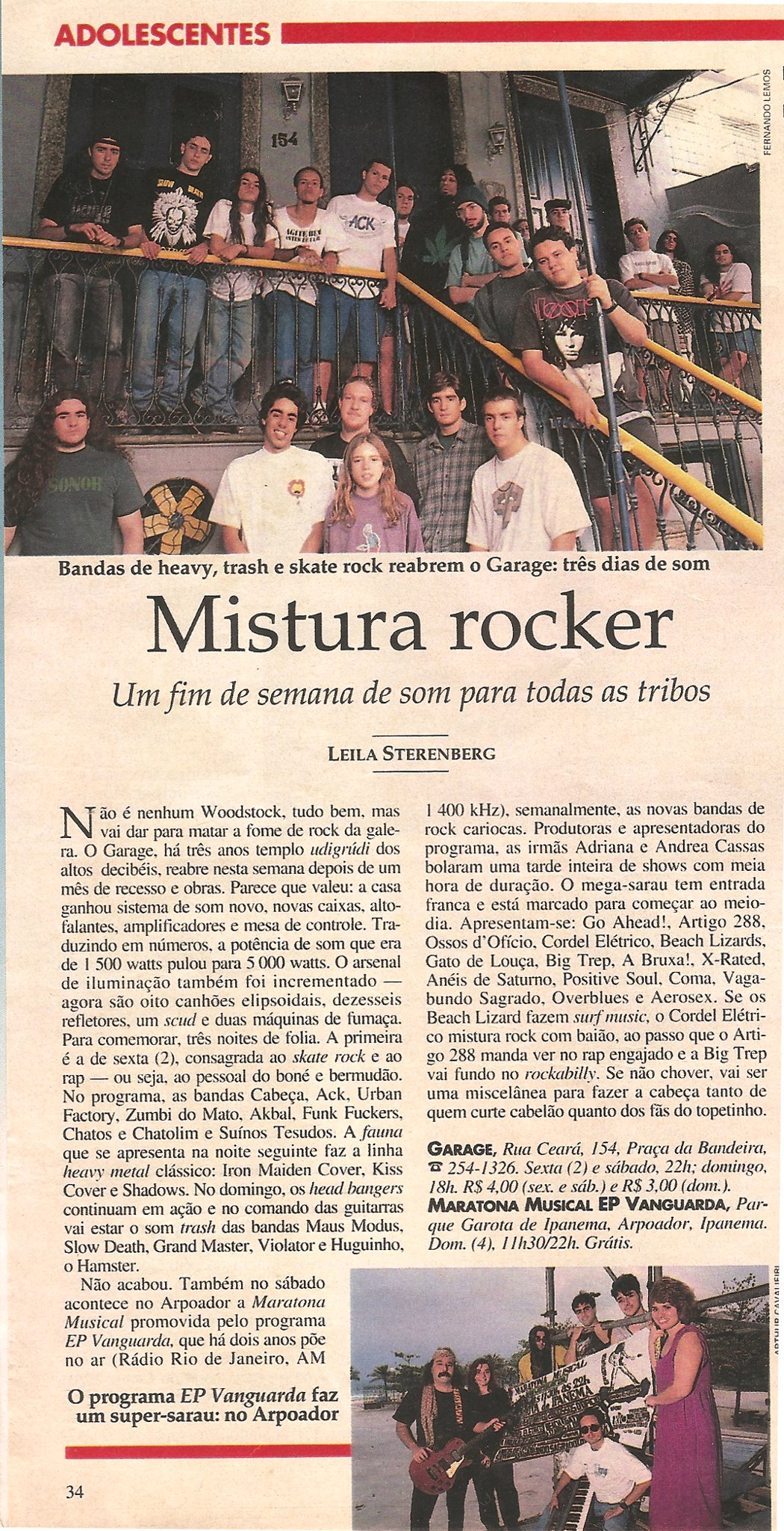 Cópia escaneada de notícia sobre a casa de shows Garage Art Cult.